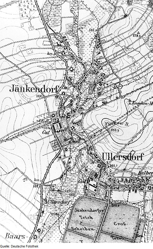 Original image description from the Deutsche Fotothek Waldhufen-Jänkendorf. Meßtischblatt, 1:25.000, Sekt. Niesky, 1886